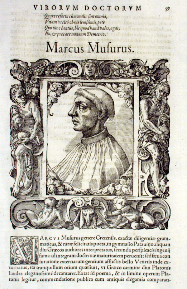 Marcus Musurus (* um 1470 in Candia auf Kreta; † 1517 in Rom), griechisch-italienischer Gelehrter und Humanist. Aus dem Buch Elogia Virorum literis illustrium von Pietro Perna und Heinrich Petri